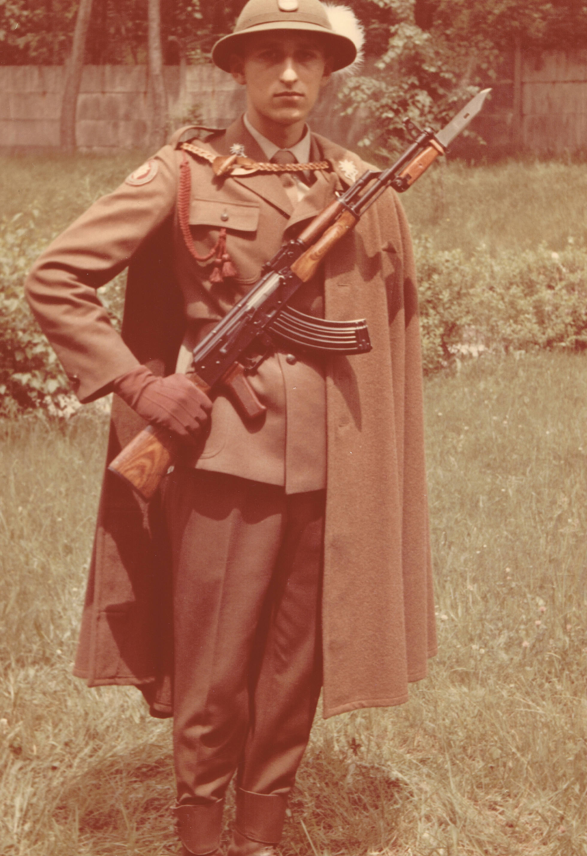 Żołnierz 5 Podhalańskiej Brygady WOW 1987r